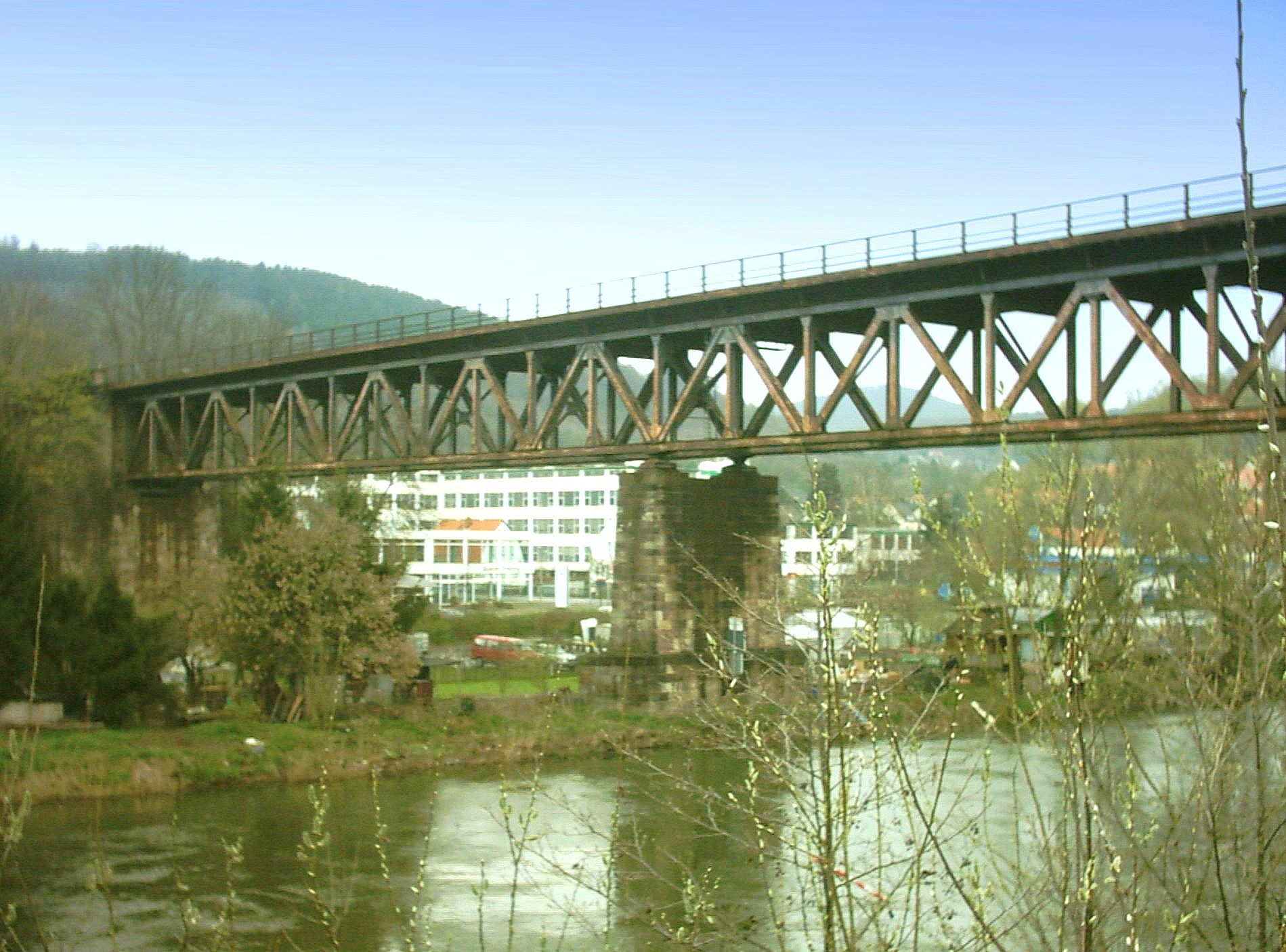 Behelfsbrücke der Südbahn in Hann.Münden Fotograf: presse03, selbst fotografiert, 11.04.2005 Lizenz: GNU-FDL Kategorie:Bild:Brücke